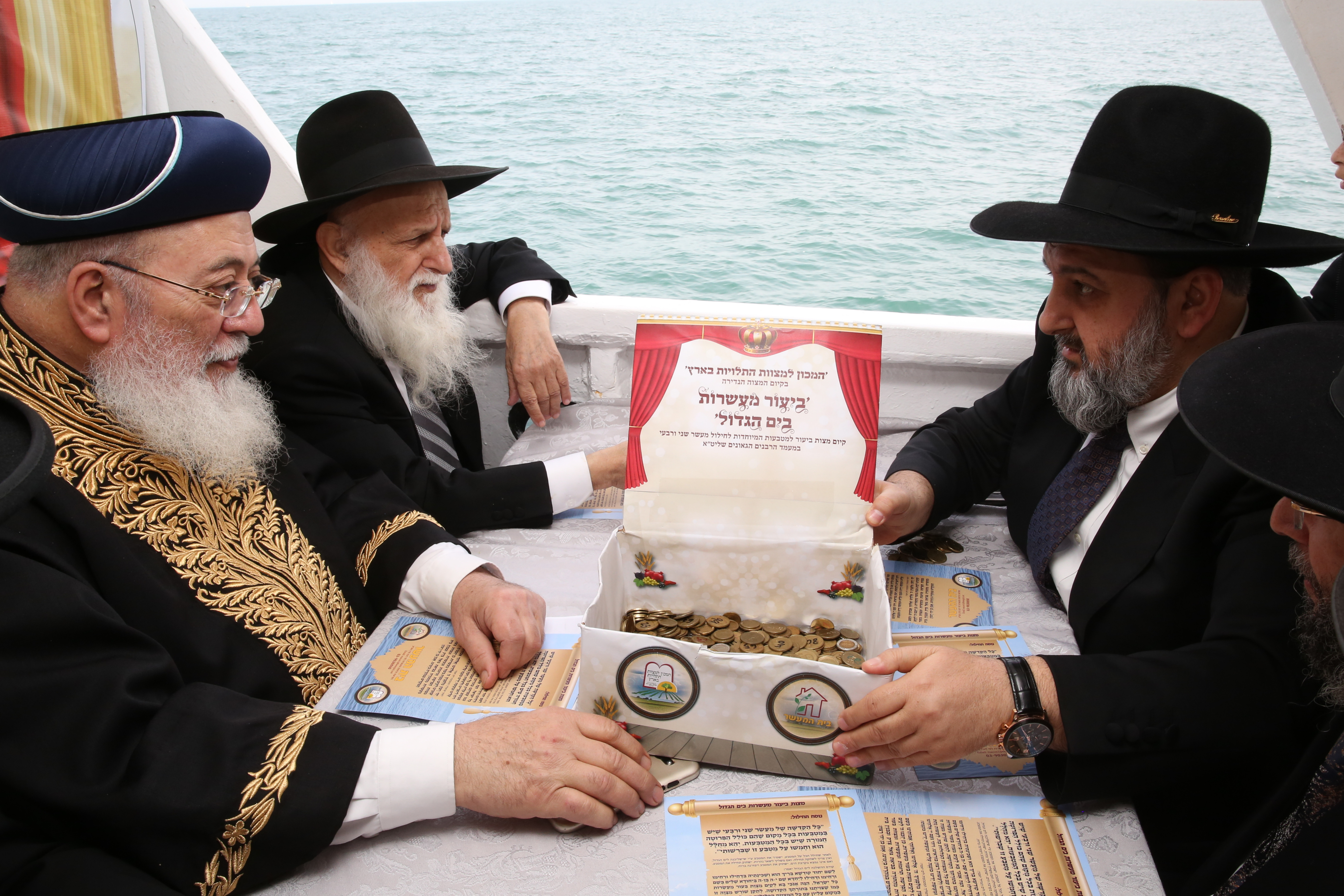 עם הראשון לציון הגאון רבי שלמה משה עמאר בביעור מעשרות בים הגדול